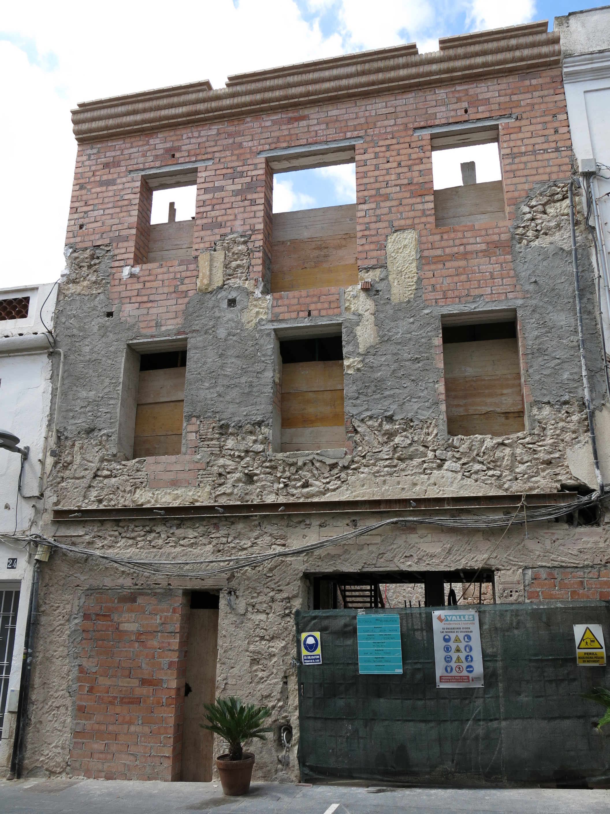 Habitatge al carrer Principal, 22 (Calafell)